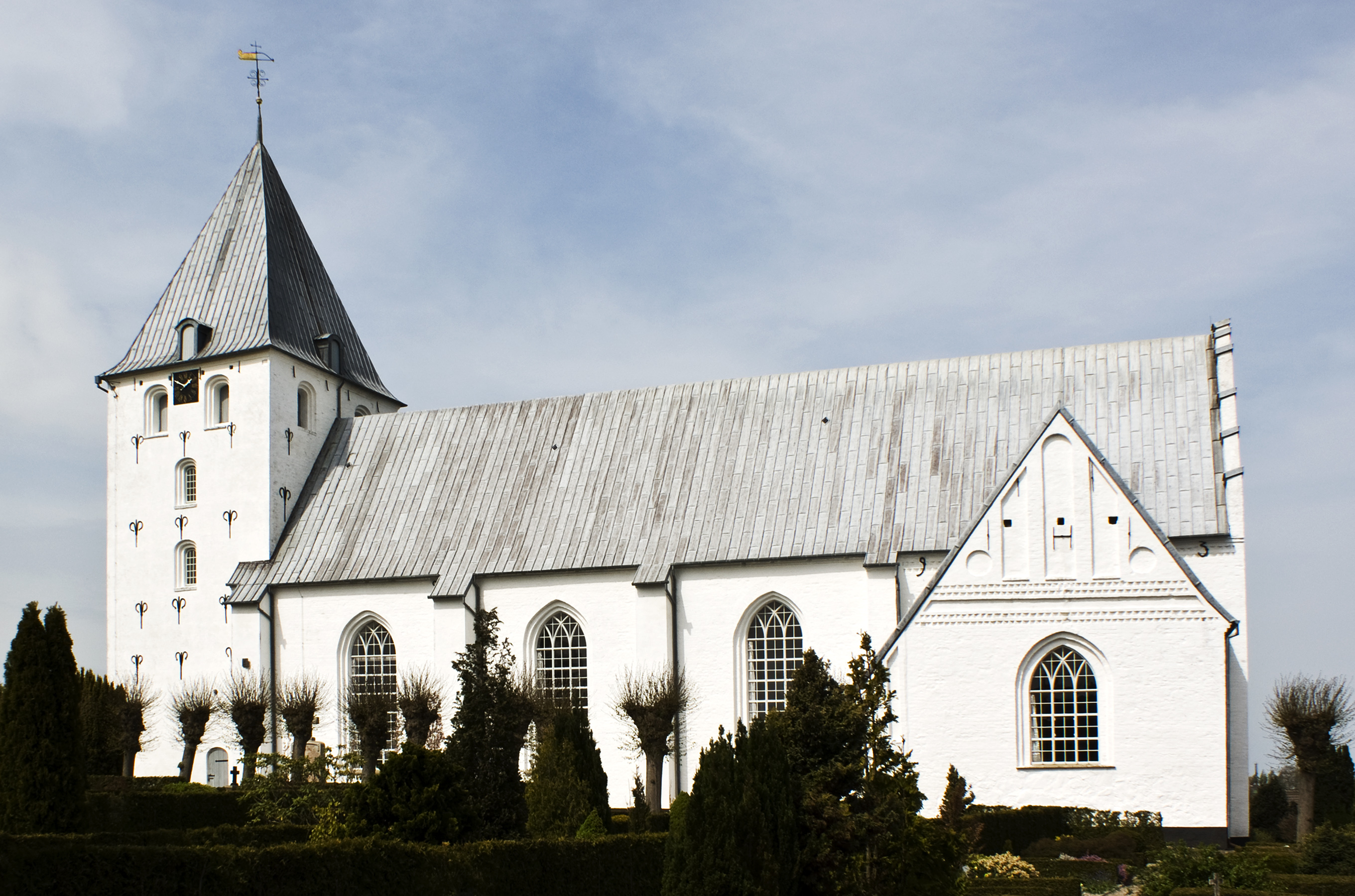 Øsby Kirke ved Haderslev set fra Syd.